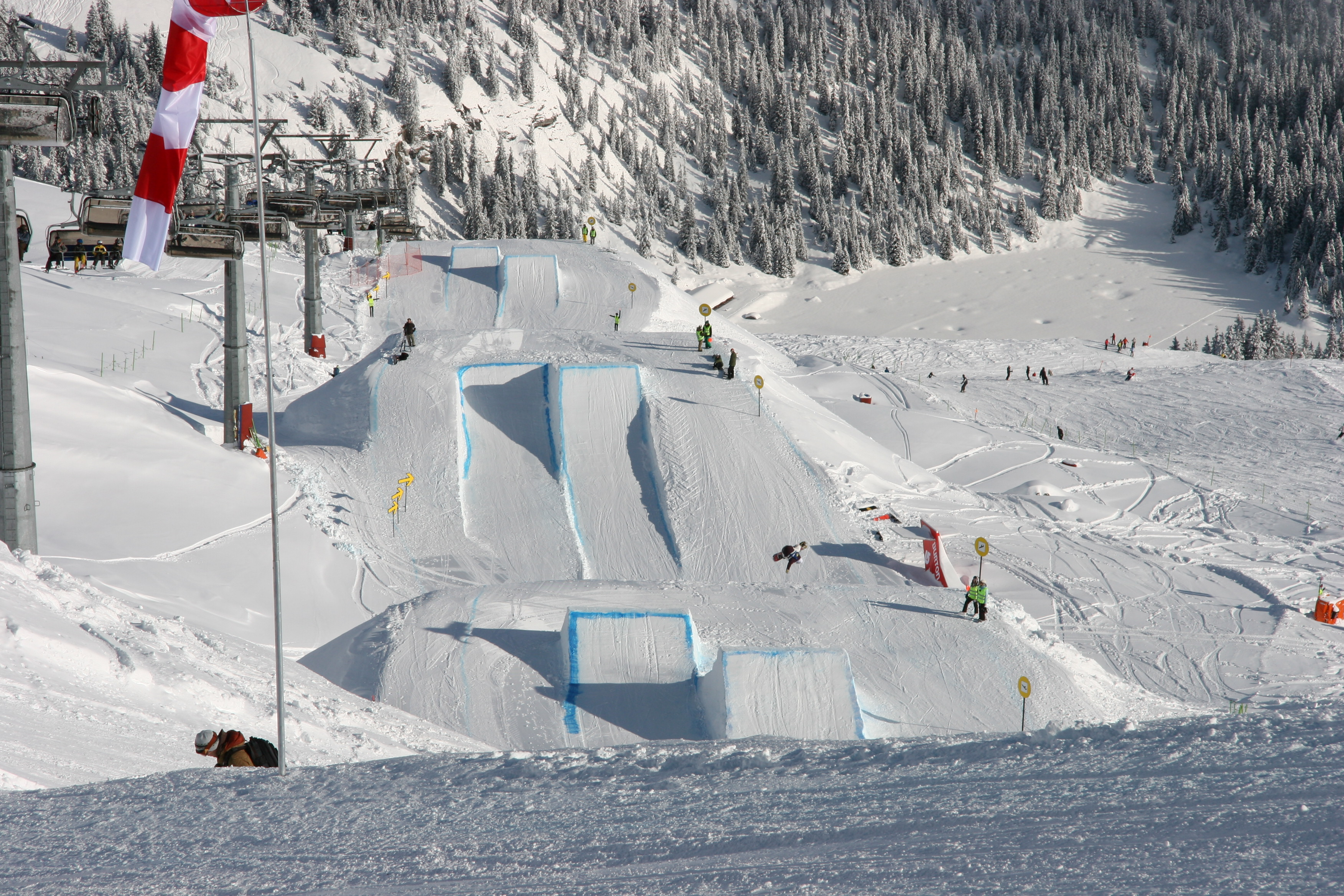 Boarders verso il cielo nella slopestyle del Burton European Open 2008